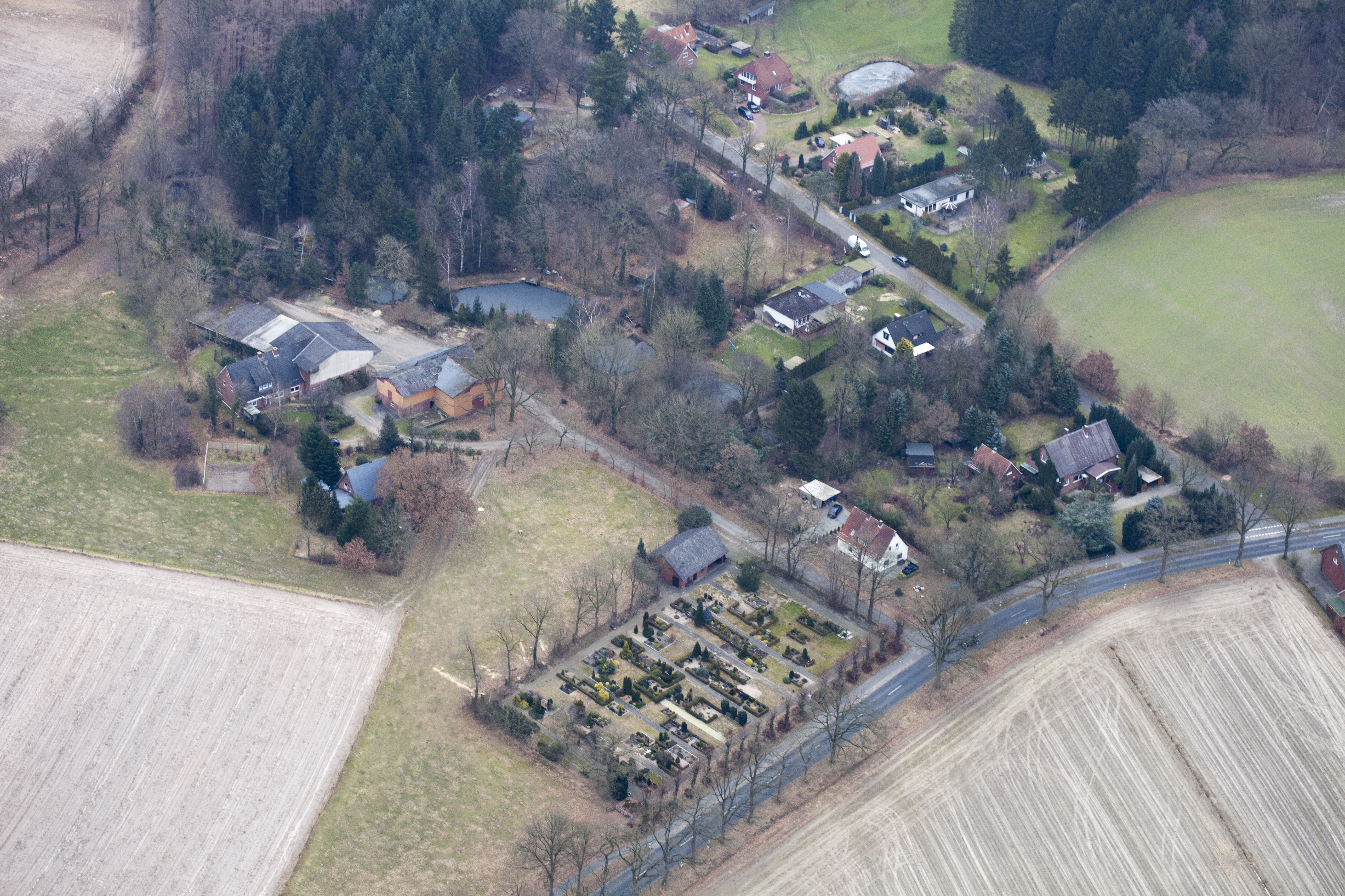 Luftaufnahme: der Friedhof von Wingst-Weißenmoor